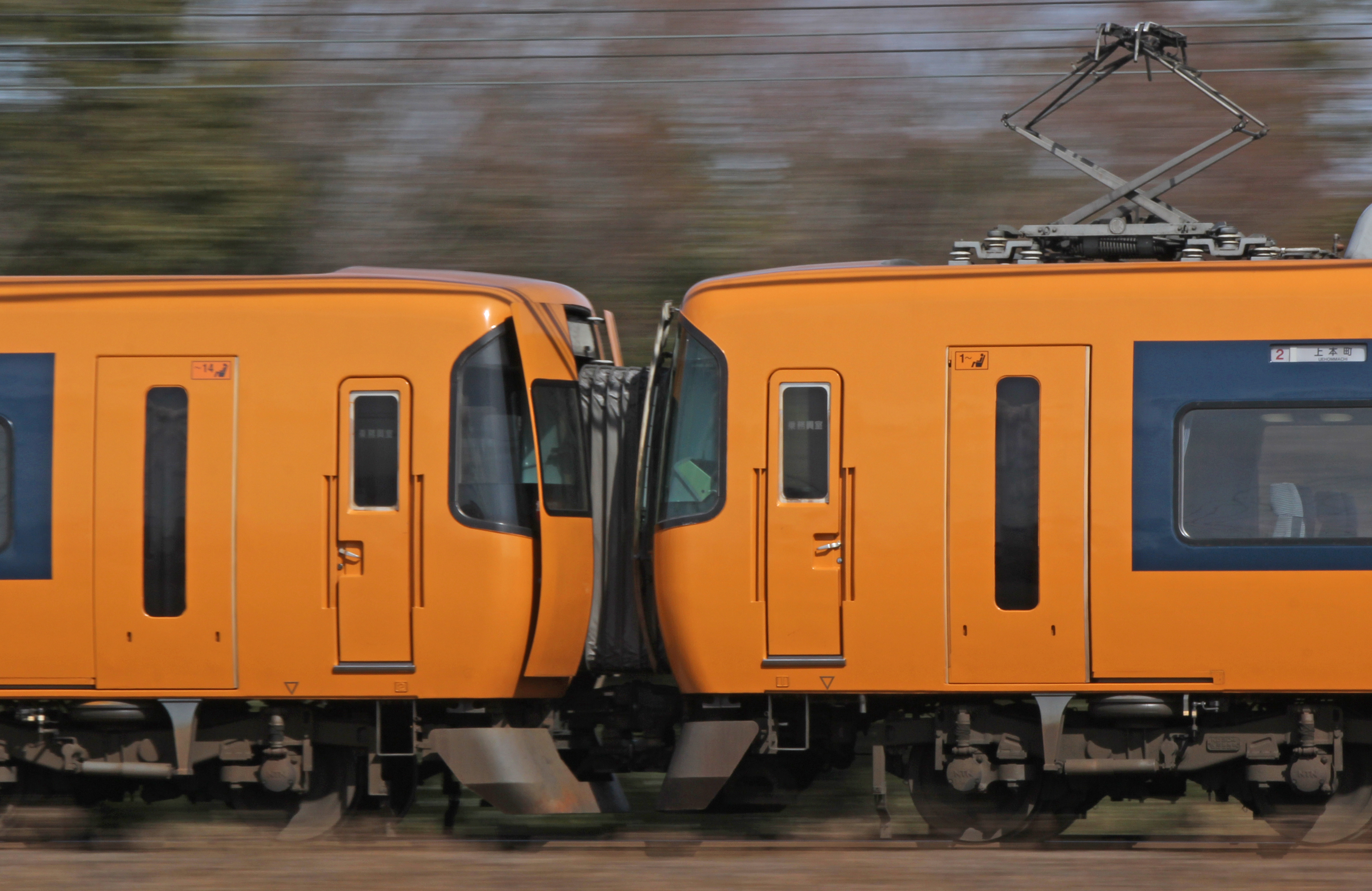 近鉄22000系併結運用